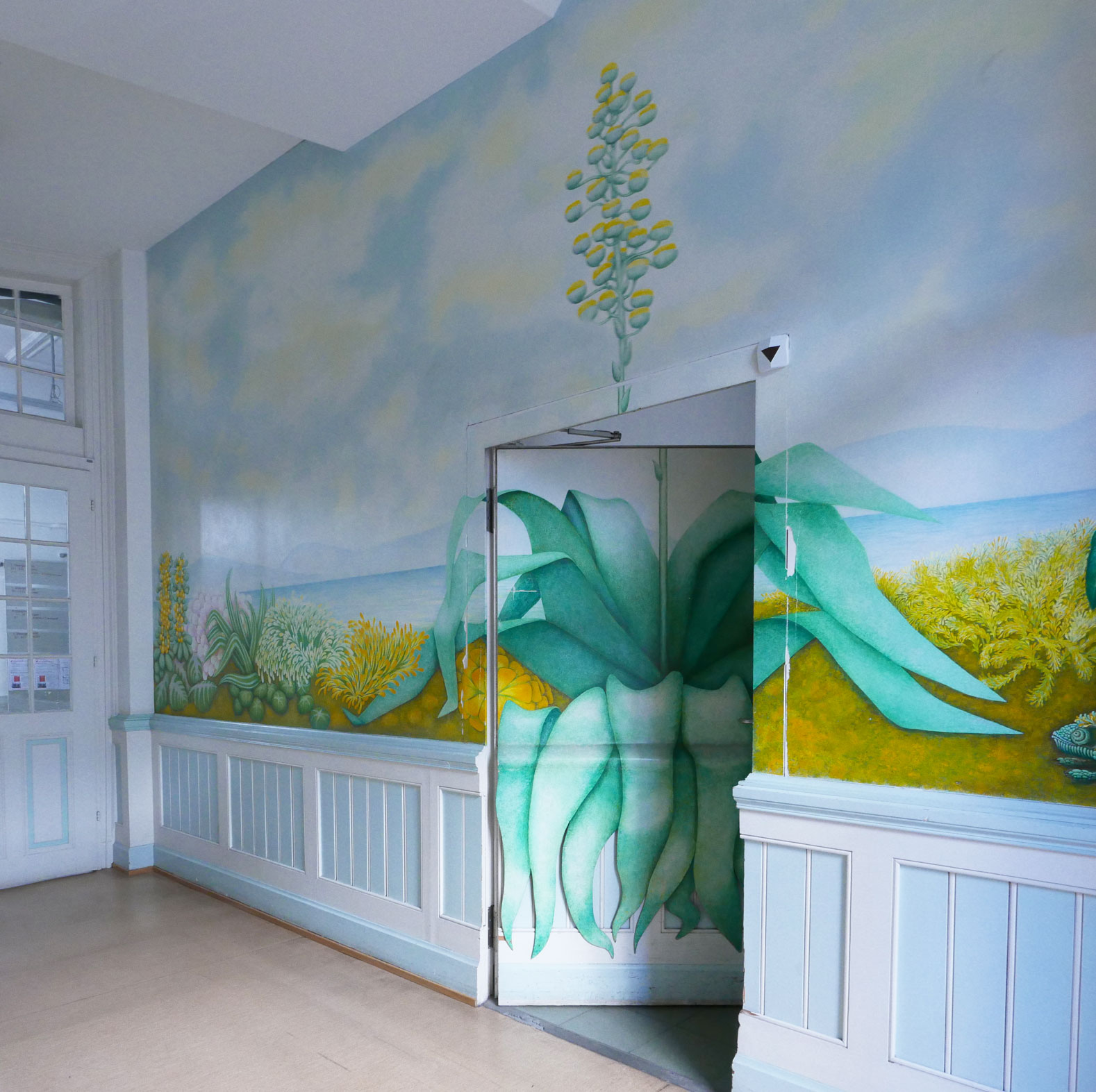 Karin Schaub, 1985, 1. Preis im Basler Kunstkredit-Wettbewerb, Wandbilder im Eingangsbereich des Instituts für Pflanzenphysiologie der Universität Basel.